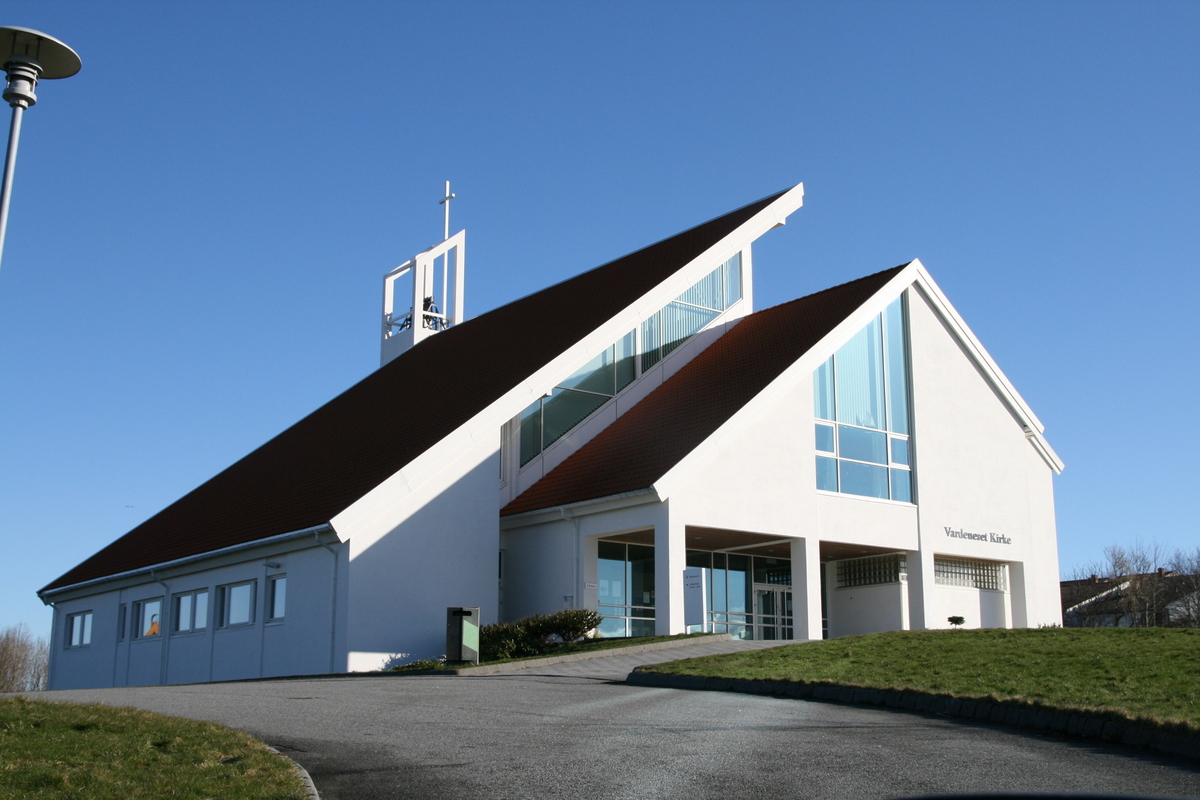 Vardeneset kirke